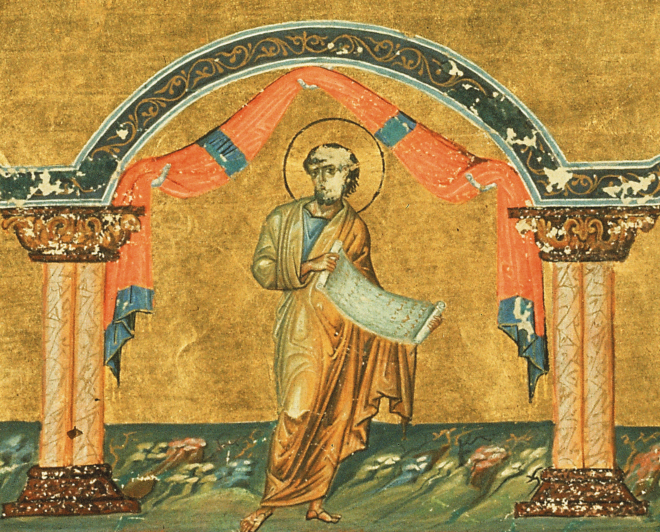 Захария Серповидец, пророк, из 12 малых пророков Миниатюра Минология Василия II. Константинополь. 985 г. Ватиканская библиотека. Рим